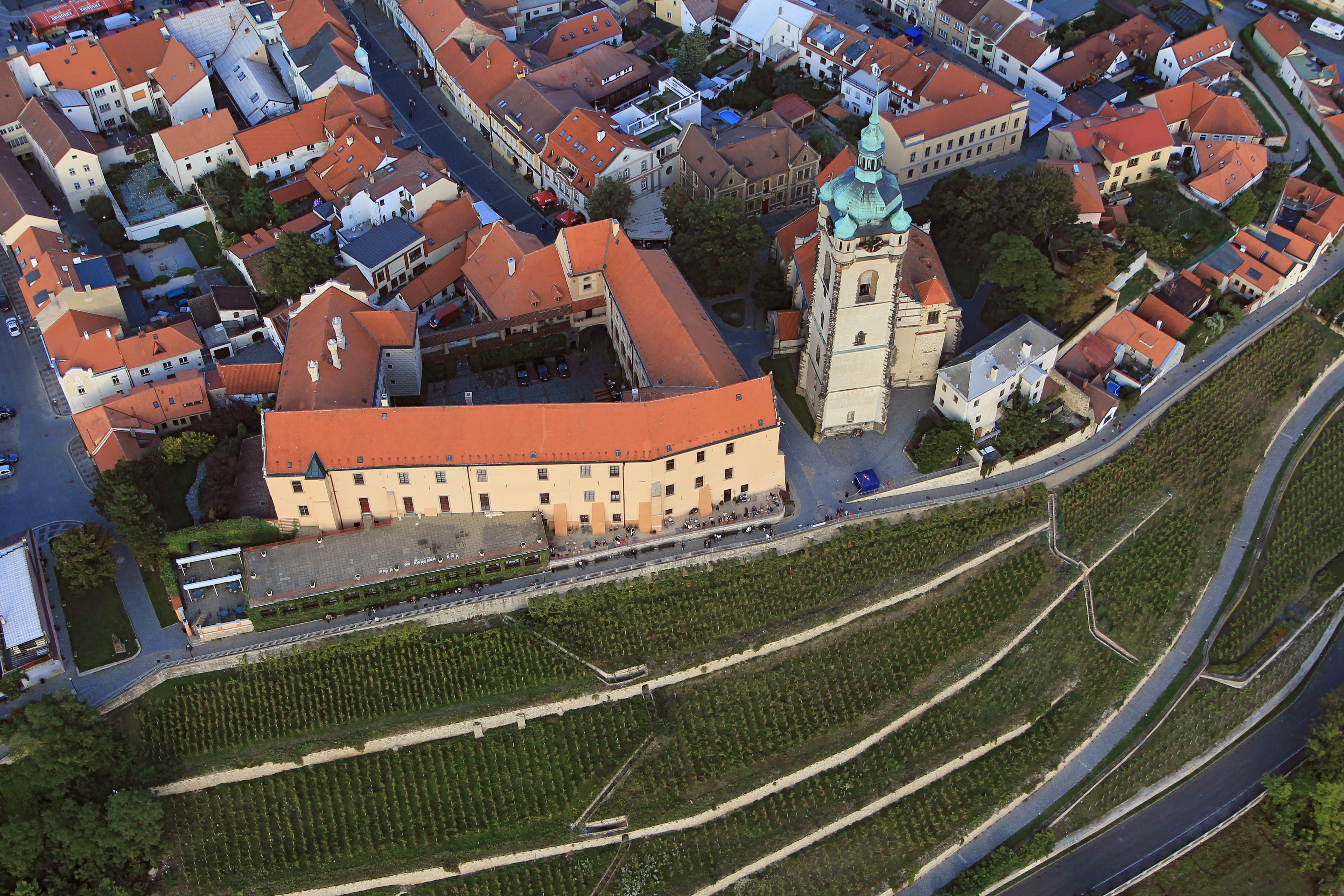 Zámek Mělník, Svatováclavská 19/16, Mělník